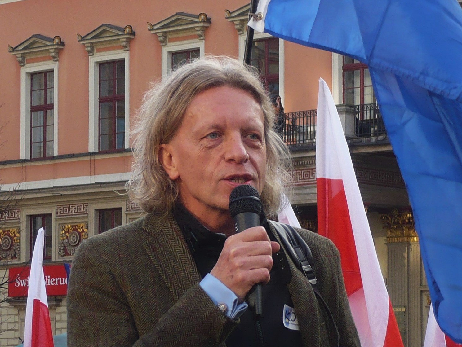 Krzysztof Mieszkowski na demonstracji KOD we Wrocławiu, 19.12.2015 r.